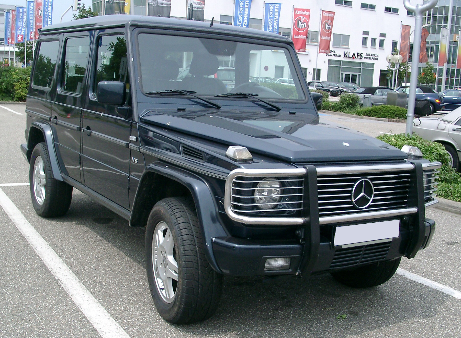 Mercedes-Benz G-Klasse